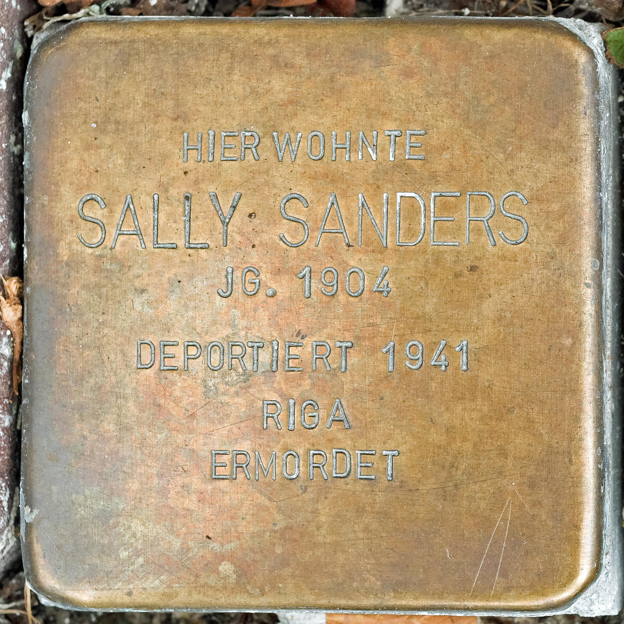 Stolperstein Sanders, Sally